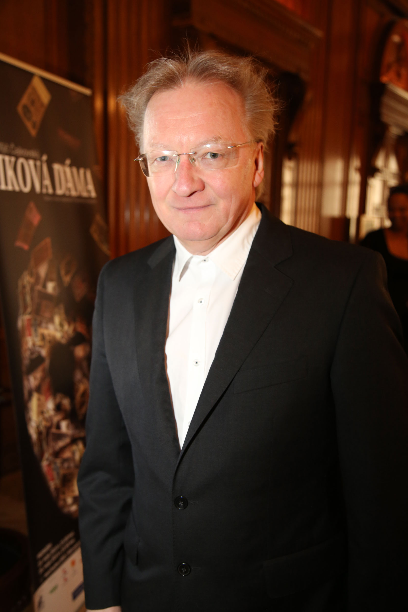 Haider_Friedrich-Musikdir.-9538